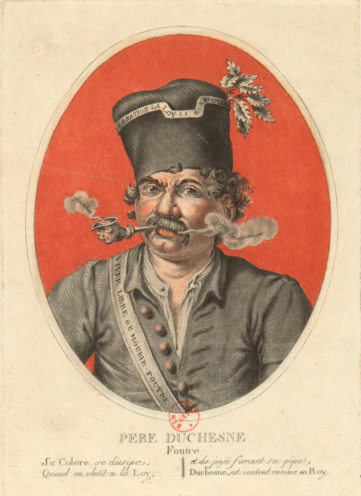 Estampe anonyme représentant le Père Duchesne, vers 1790-1794.